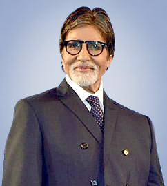 Amitabh Bachchan unveils new 'LG G3' smart phone